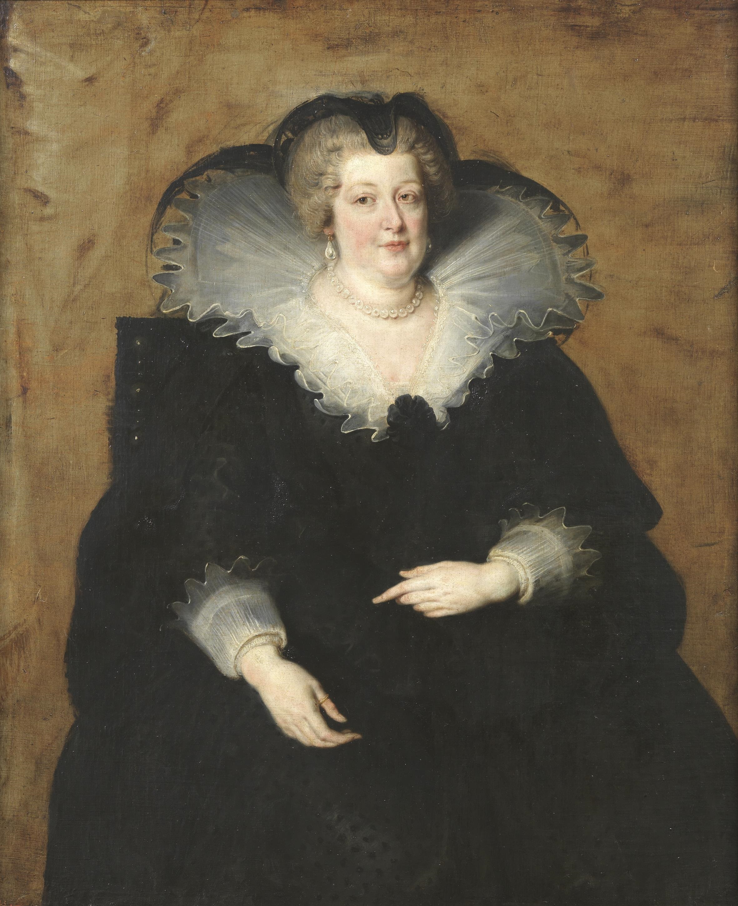 Retrato de la reina María de Médici (1575-1642), que fue reina consorte de Francia por su matrimonio con el rey Enrique IV de Francia y era hija de Francisco I de Médici, gran duque de Toscana, y de Juana de Habsburgo-Jagellón.